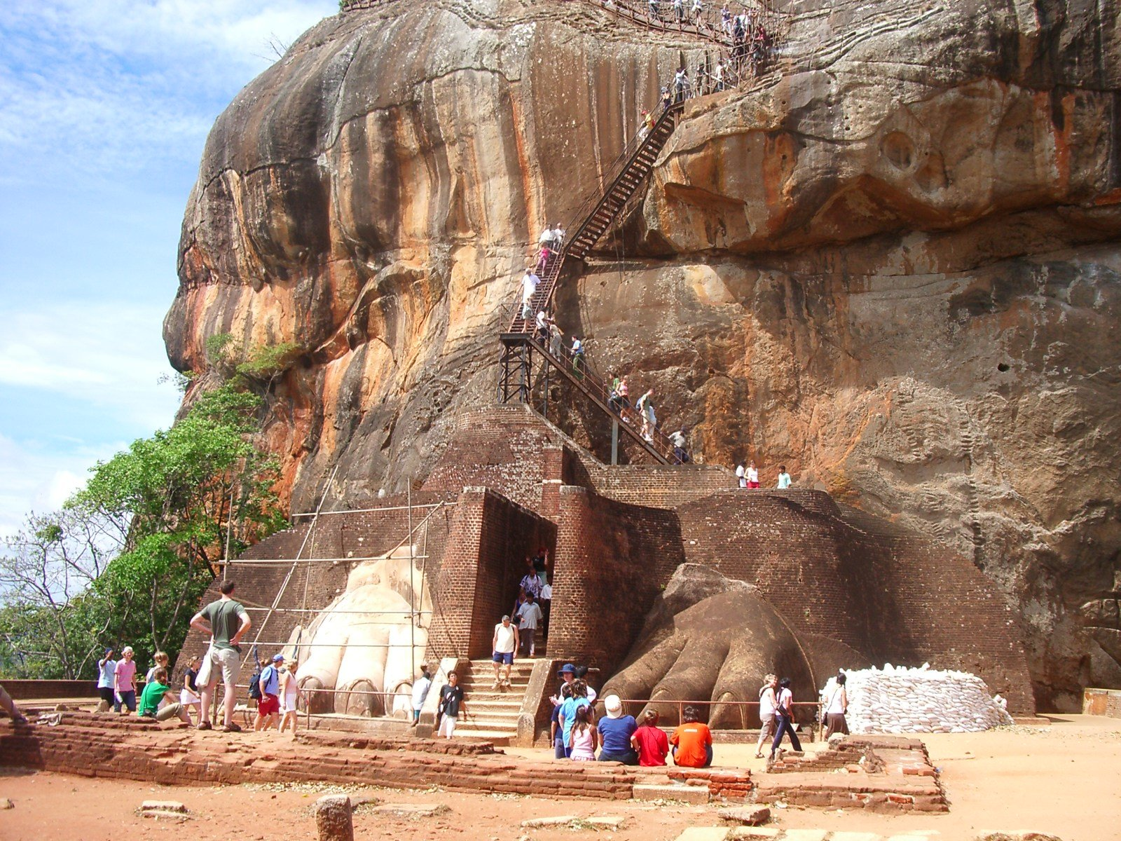 Peus del lleó i escales d'ascens a Sigiriya, foto feta per J, Ollé el juliol del 2006